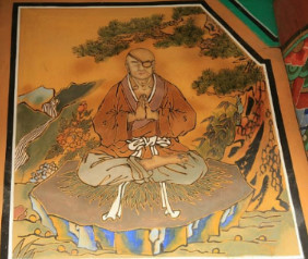 궁예